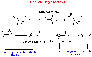 referencia tipos de hperconjugação